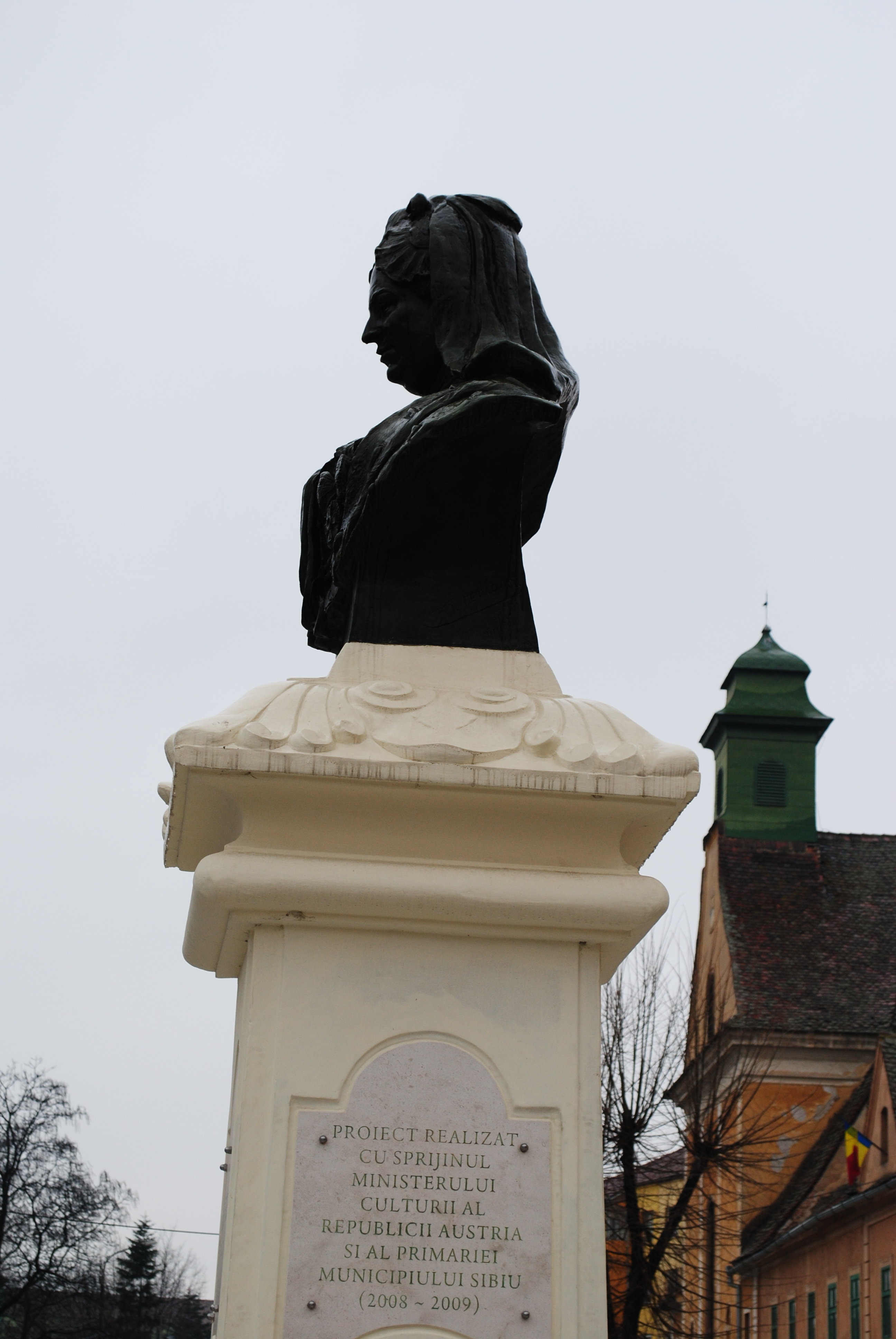 Bustul Mariei Tereza, 1909